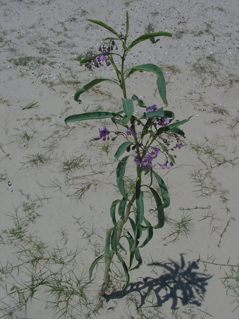 Solanum glaucophyllum - SOLANACEAE - Lagoa Mirim - Taim - RS - Brasil